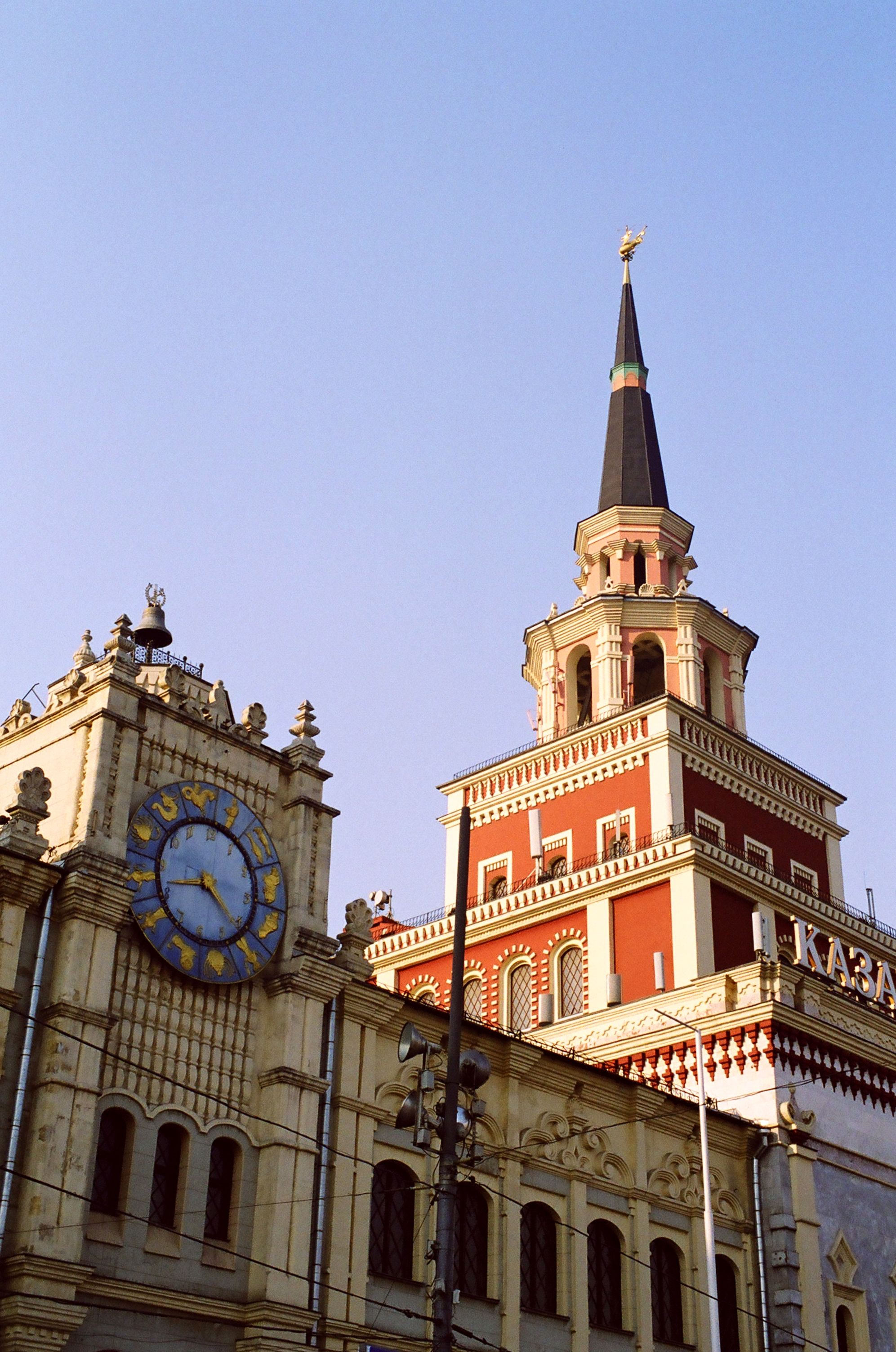 Kazan Station, Moscow